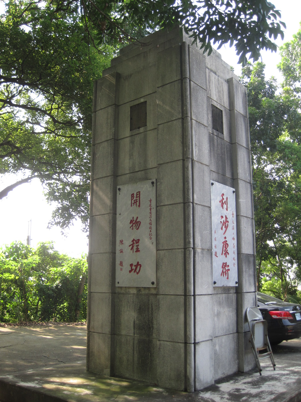 興建第二代曾文溪鐵道橋的紀念碑。原在曾文溪北岸，臺鐵曾文溪橋附近，後因興建新橋而移到拍攝時所在的官田川文山。